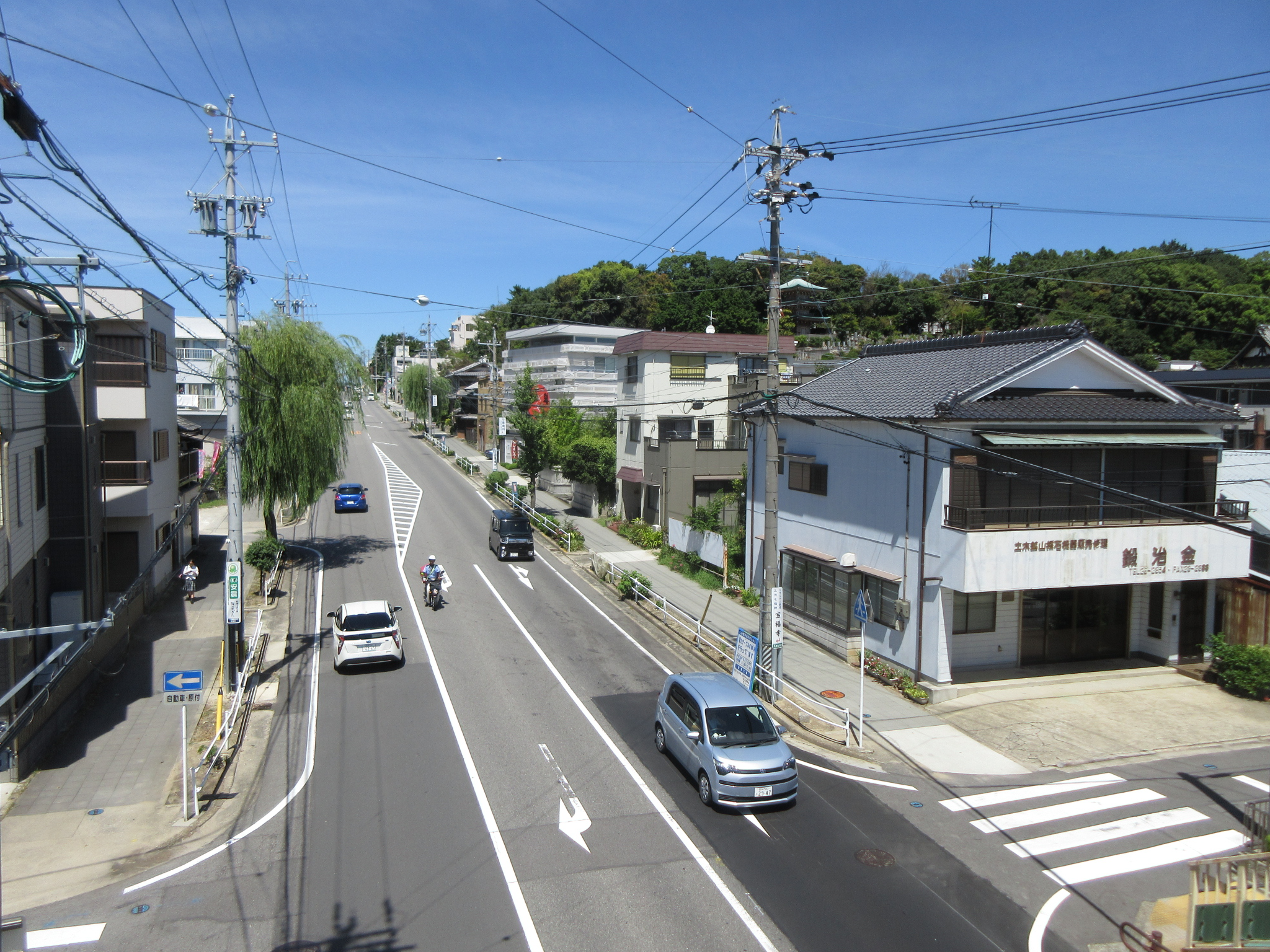 愛知県道477号東大見岡崎線。岡崎市久右ヱ門町にて撮影。